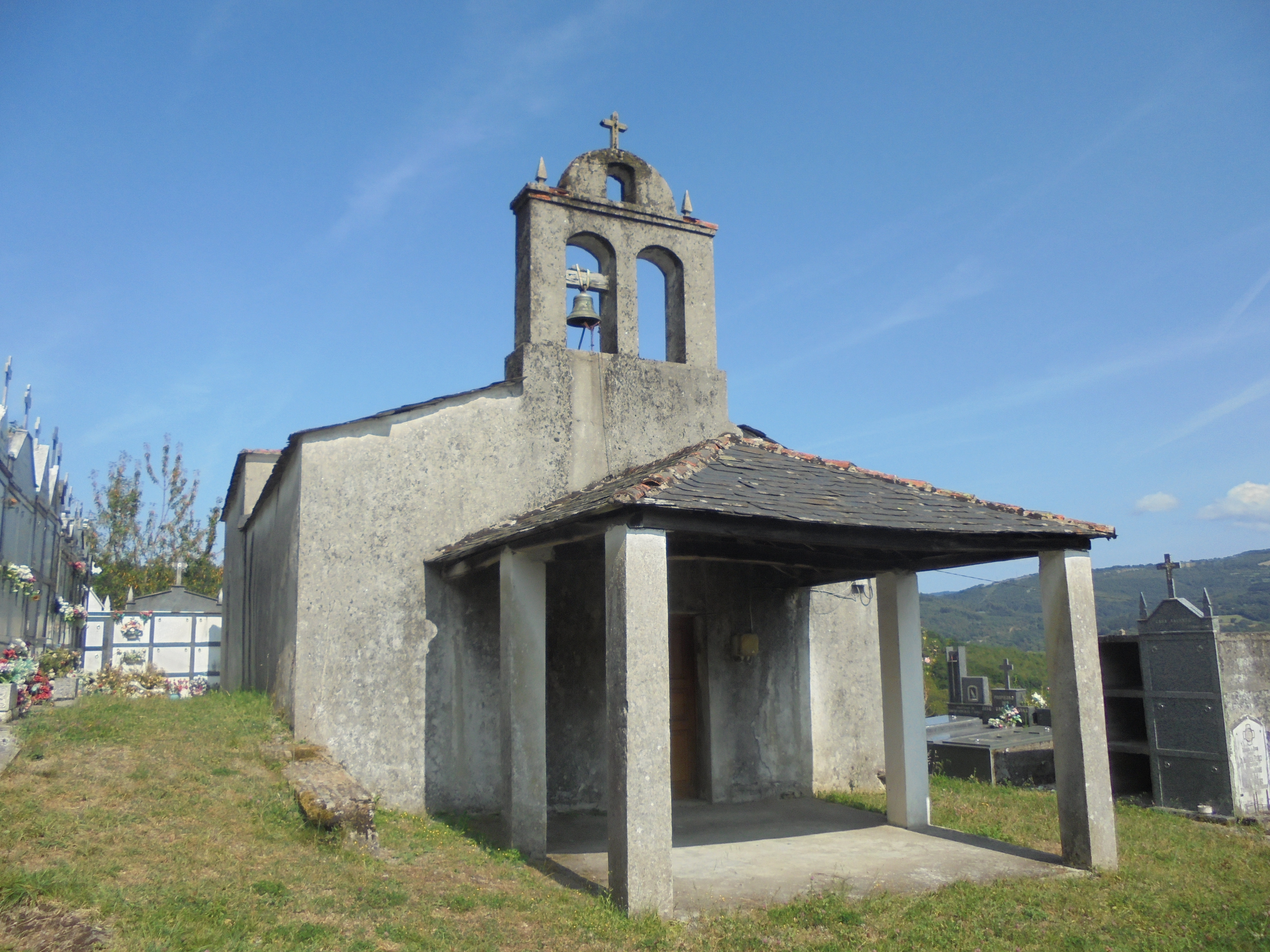 Igrexa parroquial de Ferreiros